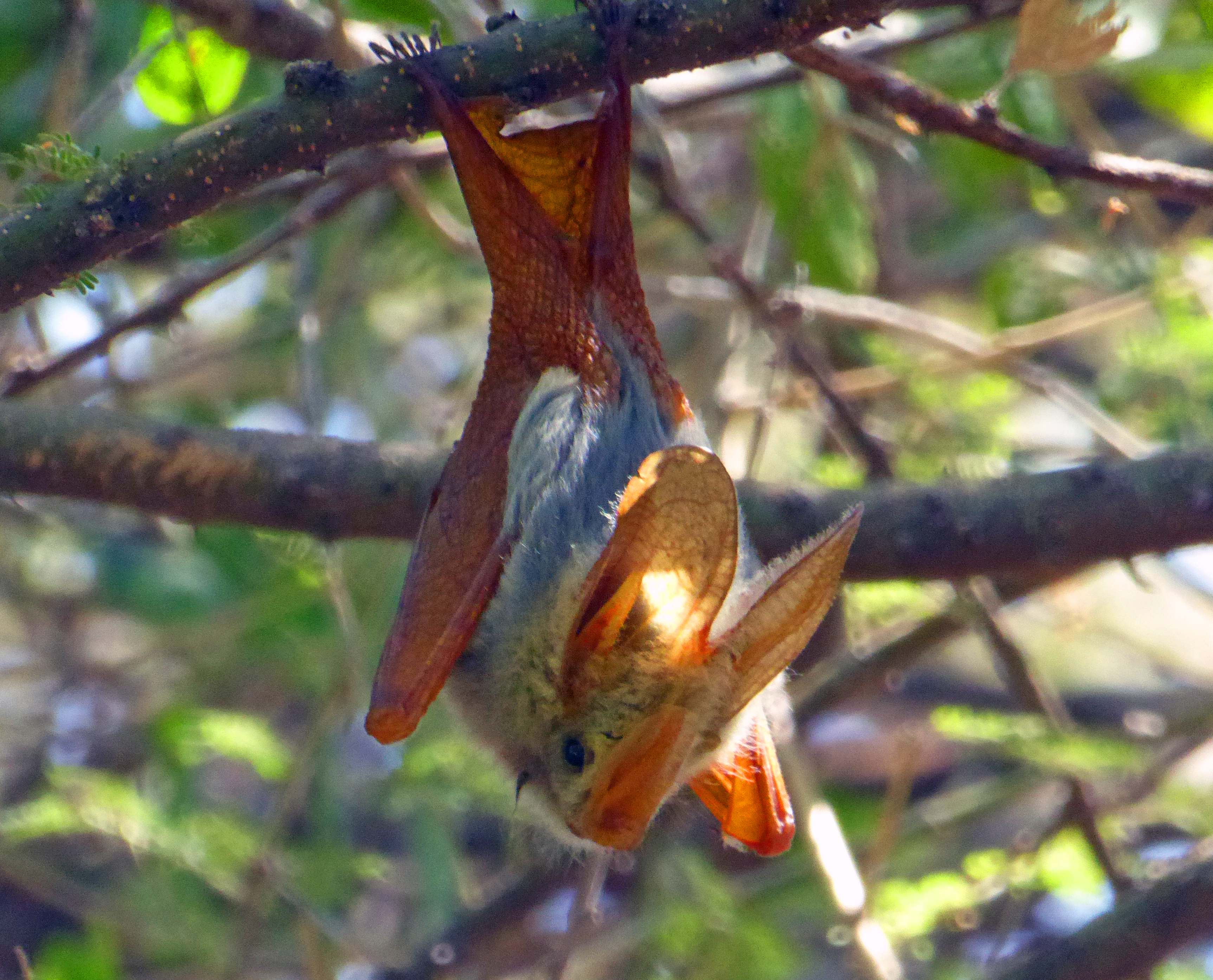 Gelbflügelfledermaus, Tansania Lake Natron 2014